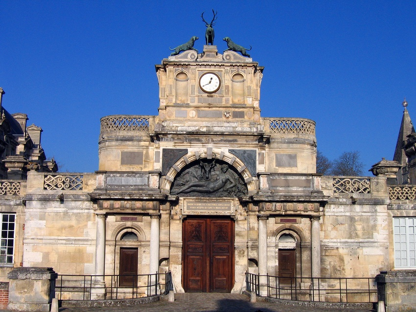 Château d'Anet, Eure-et-Loir (France).